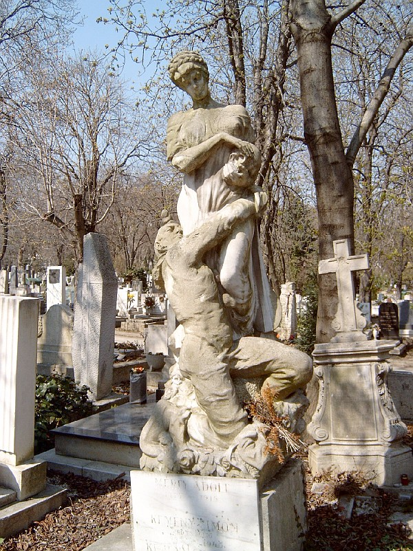 Mérei Adolf (Hatvan, 1877. febr. 7. – Bp., 1918. márc. 12.): színpadi szerző, rendező, színigazgató sírja Budapesten. Farkasréti temető: 1-1-355/356 [szobrász: Finta Sámuel].